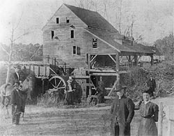 Yates Mill circa 1890-1920